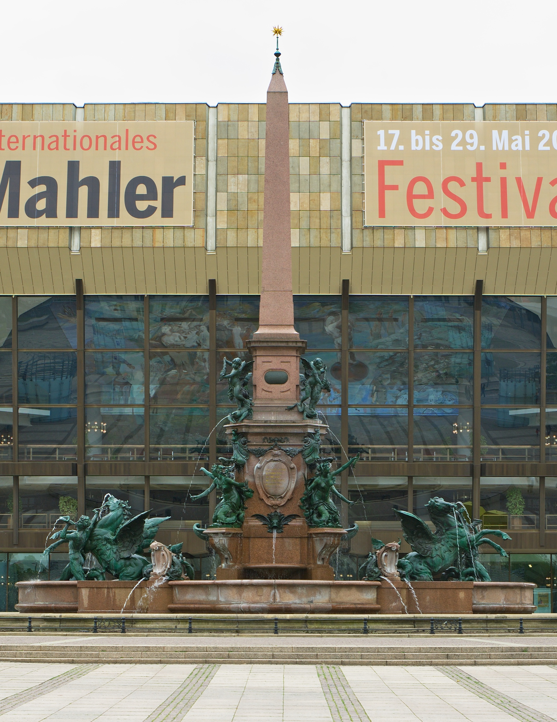 Gesamtansicht Mendebrunnen, Leipzig 2011 (vorläufiges Bild, da schlechter Hintergrund)